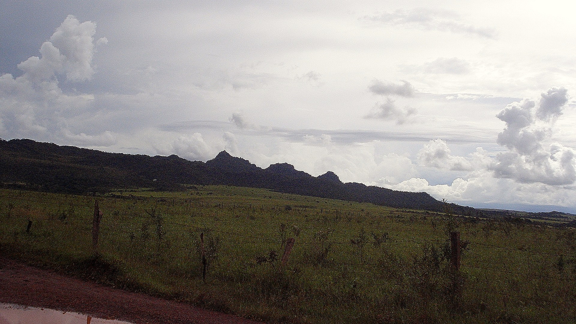 Lampião